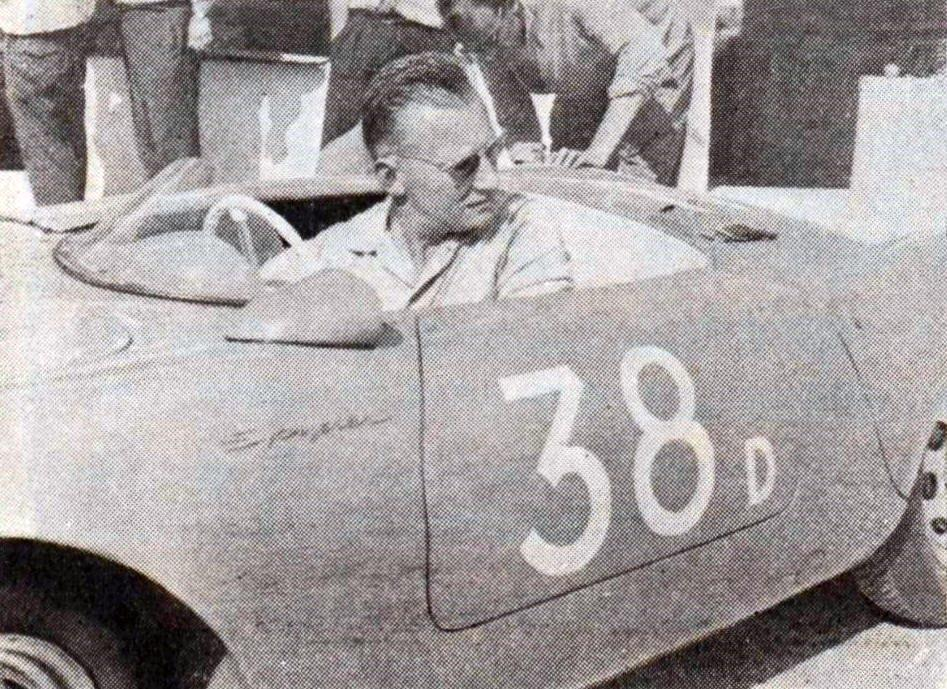 Roger Loyer sur Porsche spyder 550, en 1956 à Montlhéry (Prix de Paris, ou Coupe du salon).